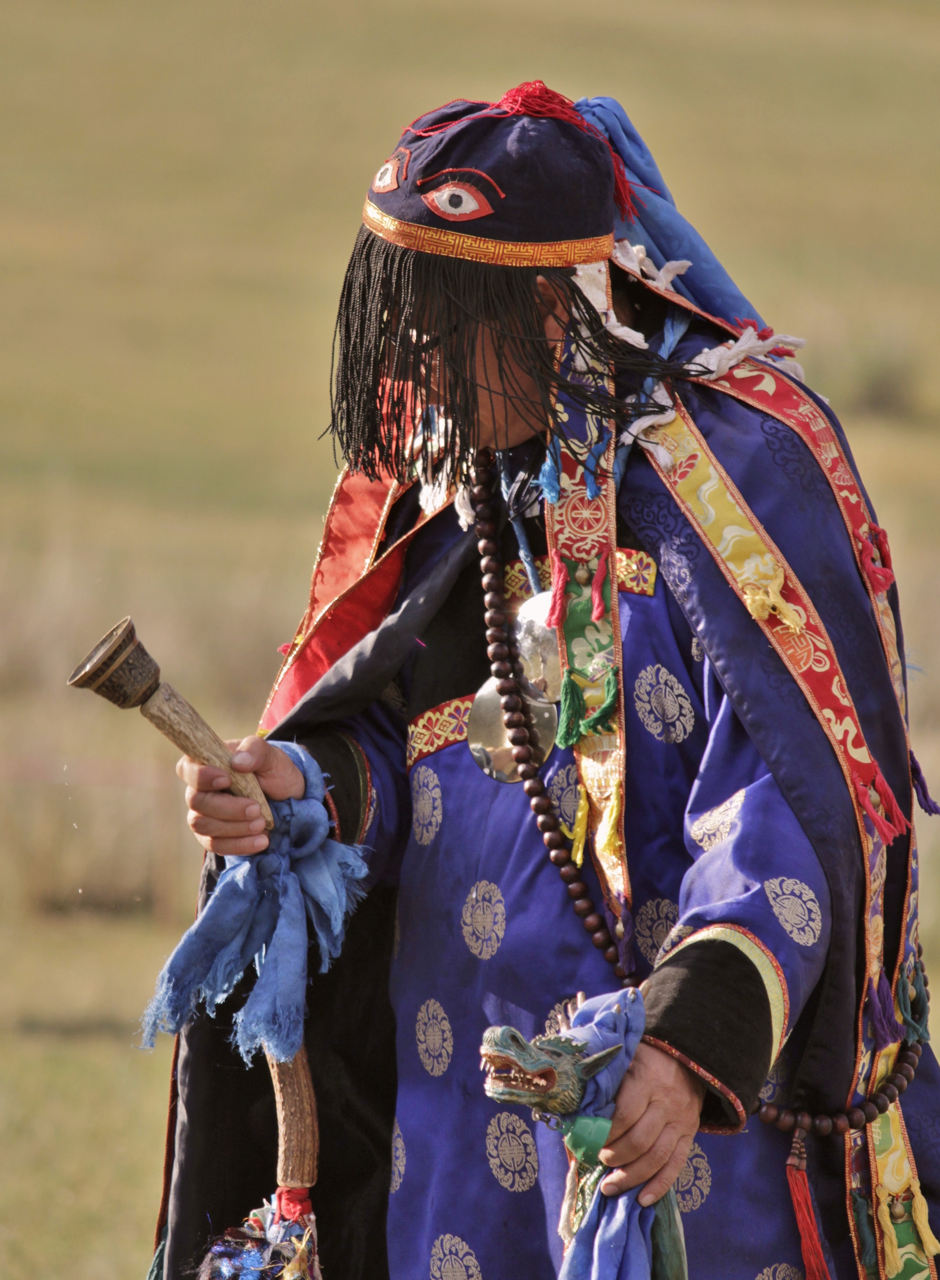 Будажап Ширеторов - руководитель шаманской общины "Алтан Сэргэ"